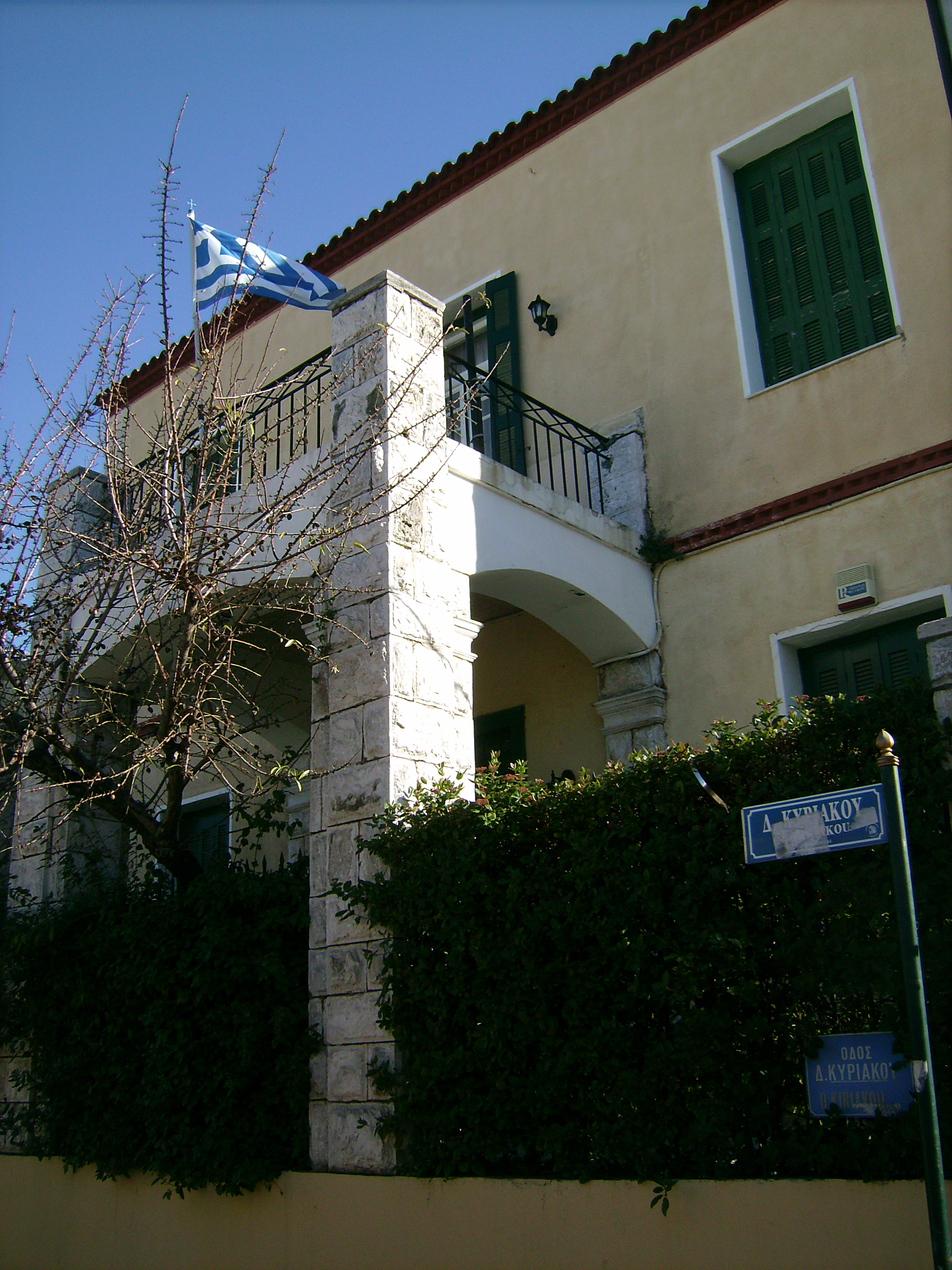 Εξωτερική άποψη του Μουσείου Δροσίνη (Αγίων Θεοδώρων και Διομ. Κυριακού, Κηφισιά).